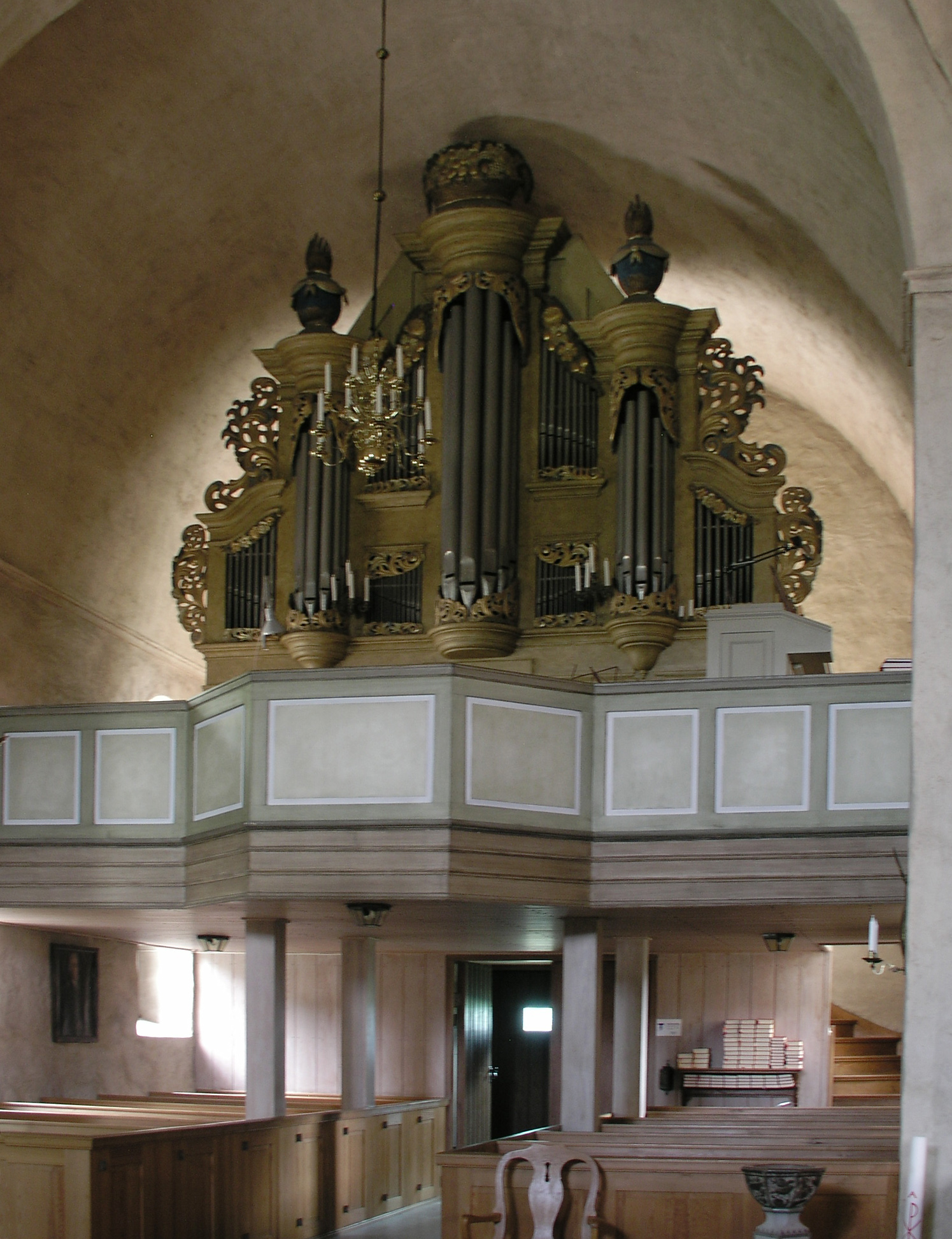 Heda kyrka, Diocese of Linköping, Ödeshögs kommun. Organ.